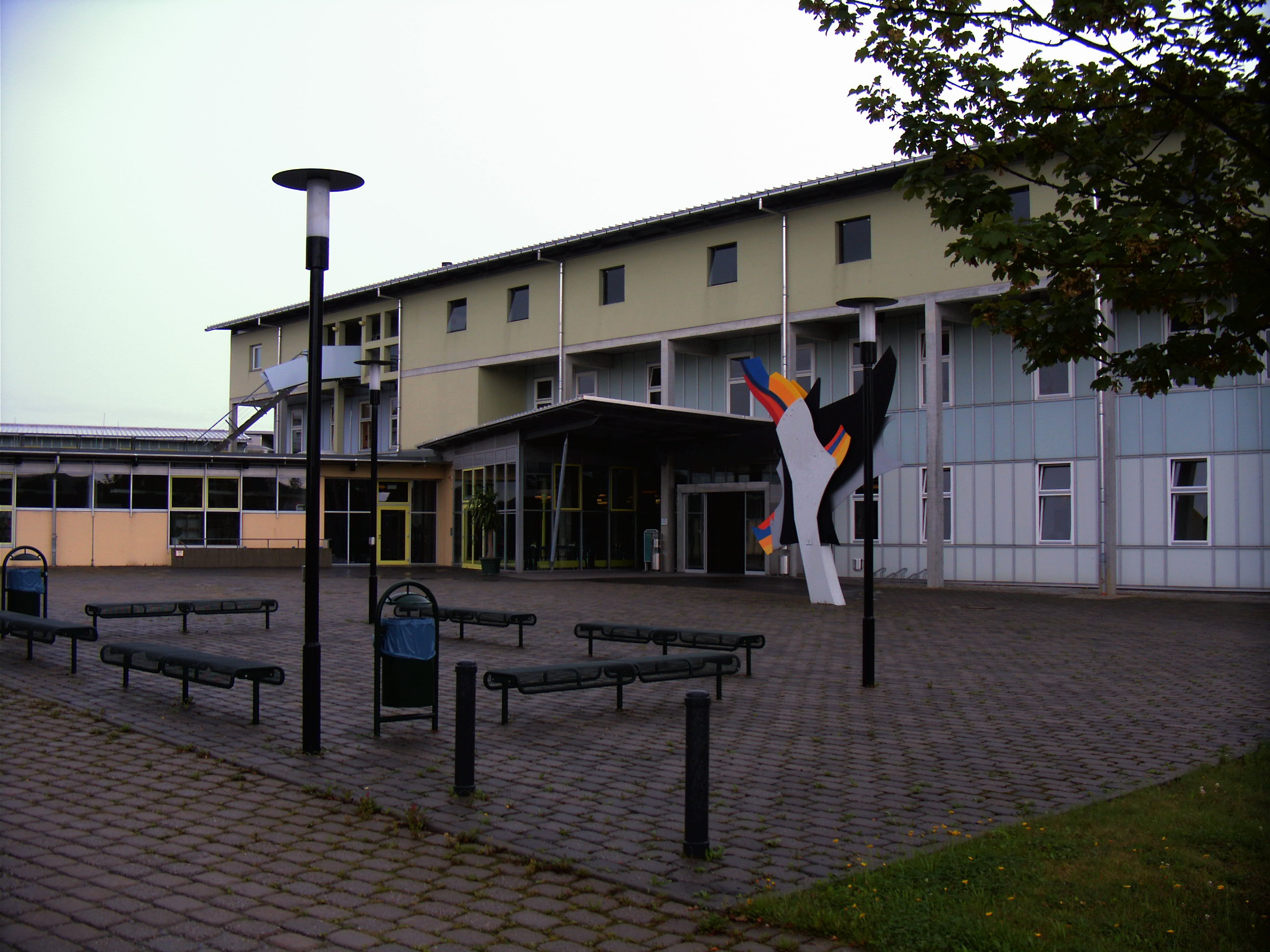 Das Ausbildungszentrum Bobritzsch, Eingang.